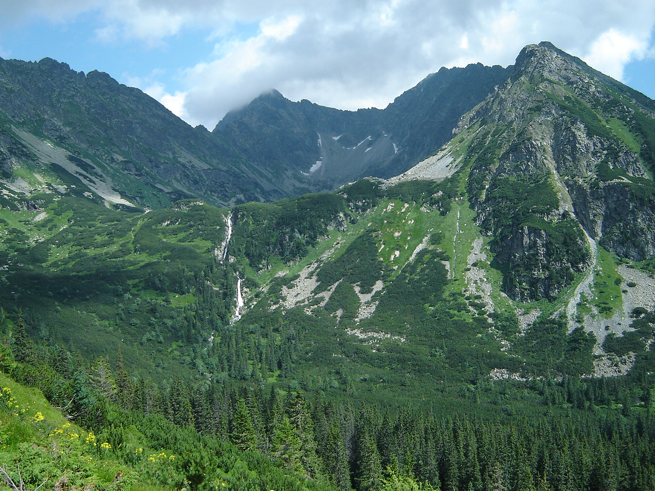 Temnosmrečinská dolina Vajanského vodopád